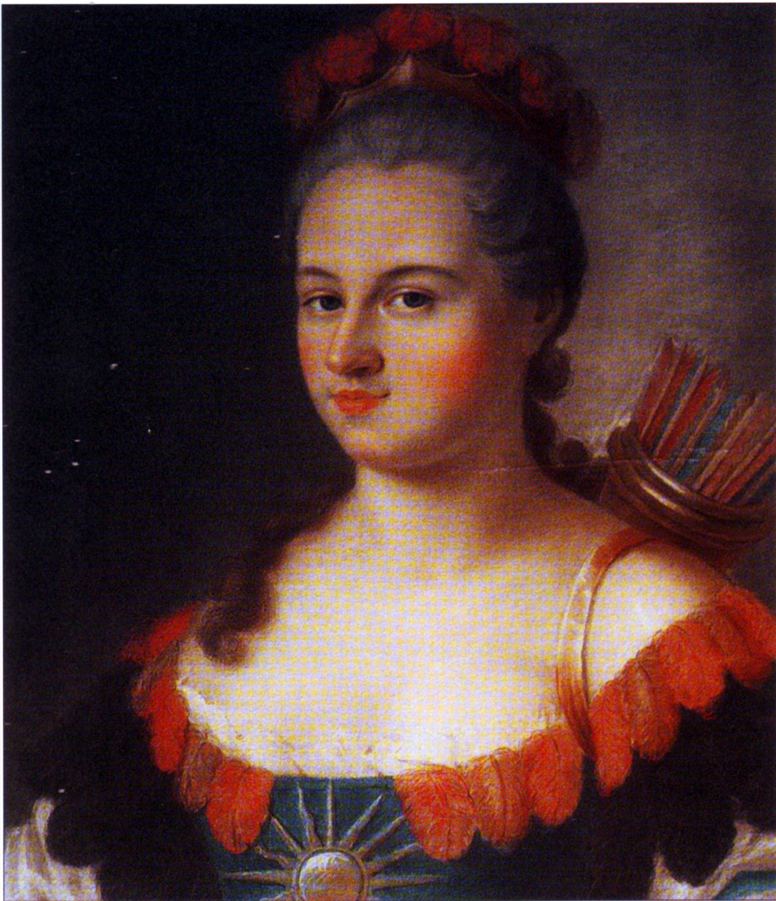 Жан де Самсуа. Портрет М.Г. Тепловой - "Америка", 1756. Матрена Герасимовна Теплова (ум. после 1791), дочь казака Герасима Демьяновича Демешко, в 1742 году принявшего фамилию "Стрешенцов" и приходившегося братом Н.Д. Разумовской, матери Кирилла и Алексея. С 1754 (?) жена тайного советсника Г.Н. Теплова (1711-1779), фаворитка Петра III.